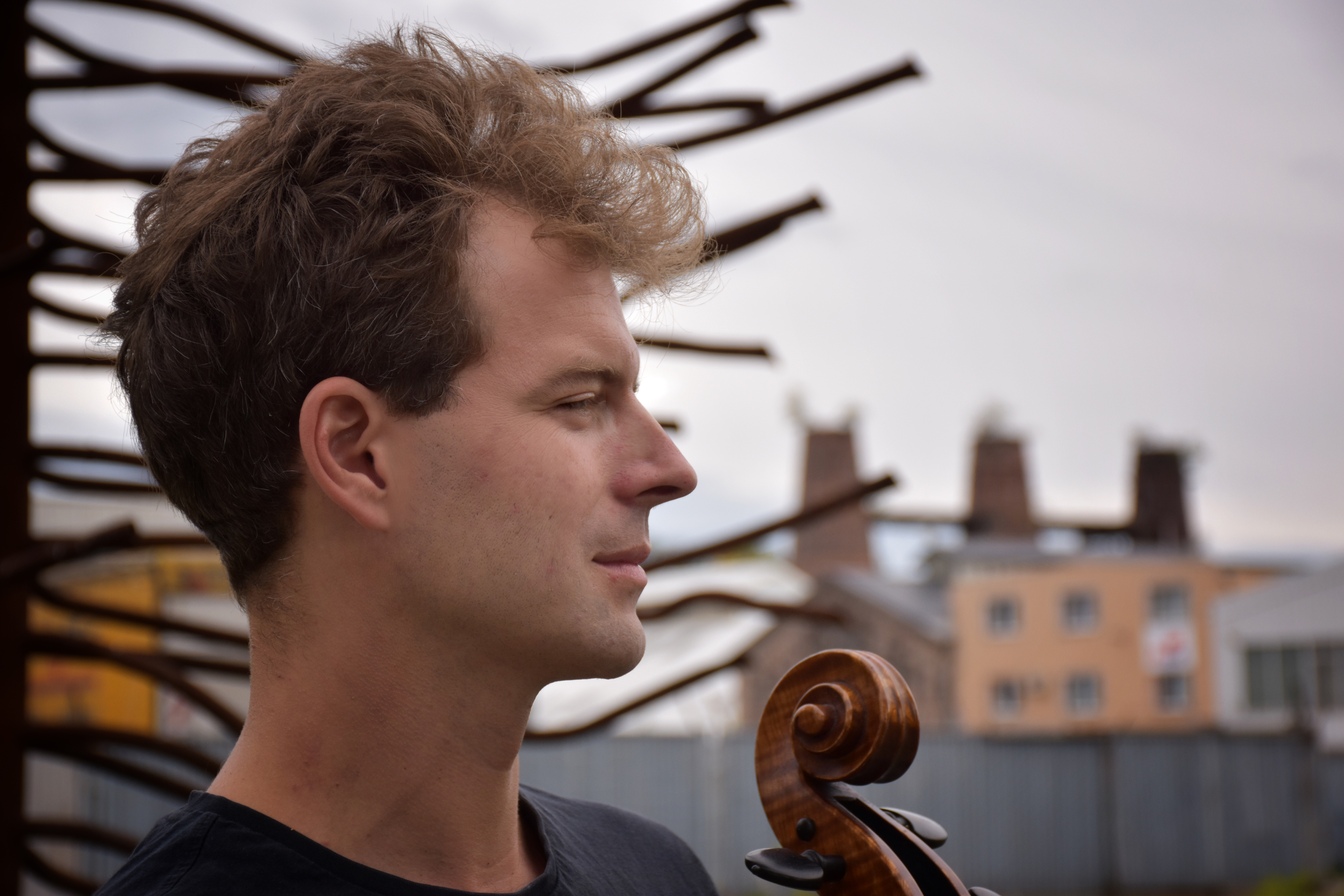 Štěpán Filípek